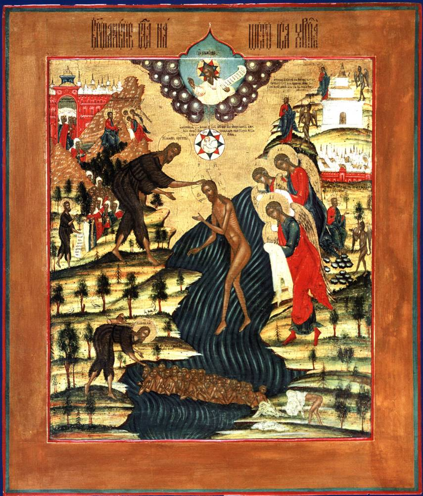 Baptism of Jesus whith scens of Temptation of Christ (russian icon) Богоявление с евангельским сказанием об искушении Христа 19 век. Палех Дерево, левкас, темпера. 45,3х39 см. В центре композиции - обнаженный Христос, стоящий в водах Иордана. На Его голову возложена рука Иоанна Предтечи, изображенного слева, на берегу реки. На другом берегу (справа) - три склонившихся ангела с белыми пеленами в руках. Над Христом, в белом круге голубь - Святой Дух в восьмиконечном нимбе. В правой и левой частях композиции помещены более мелкие изображения на текст Евангелия от Луки (гл. 4) об искушении Христа дьяволом. Справа: дьявол предлагает Христу превратить камни в хлеб; дьявол предлагает Христу все царства вселенной за поклонение ему; дьявол предлагает Христу броситься с кровли храма. Слева: дьявол оставляет Христа (перед Христом склонились три ангела с пеленами в руках). Христа, изображенного в последней сцене, благословляет Бог-Отец, образ Которого помещен вверху в центре, в облаках, в голубом небе под килевидной аркой. В левой же части композиции изображены иерусалимляне, исходящие из ворот города и направляющиеся к Предтече, встречающему их со свитком в руках. Внизу в водах Иордана - народ, крещаемый склонившимся Иоанном ("Собор Иоанна Предтечи"). В состав композиции входят редкие изображения на евангельский текст. Вероятно, мастер пользовался образцом конца XVIII в. Икона имеет художественное значение, представляет музейный интерес